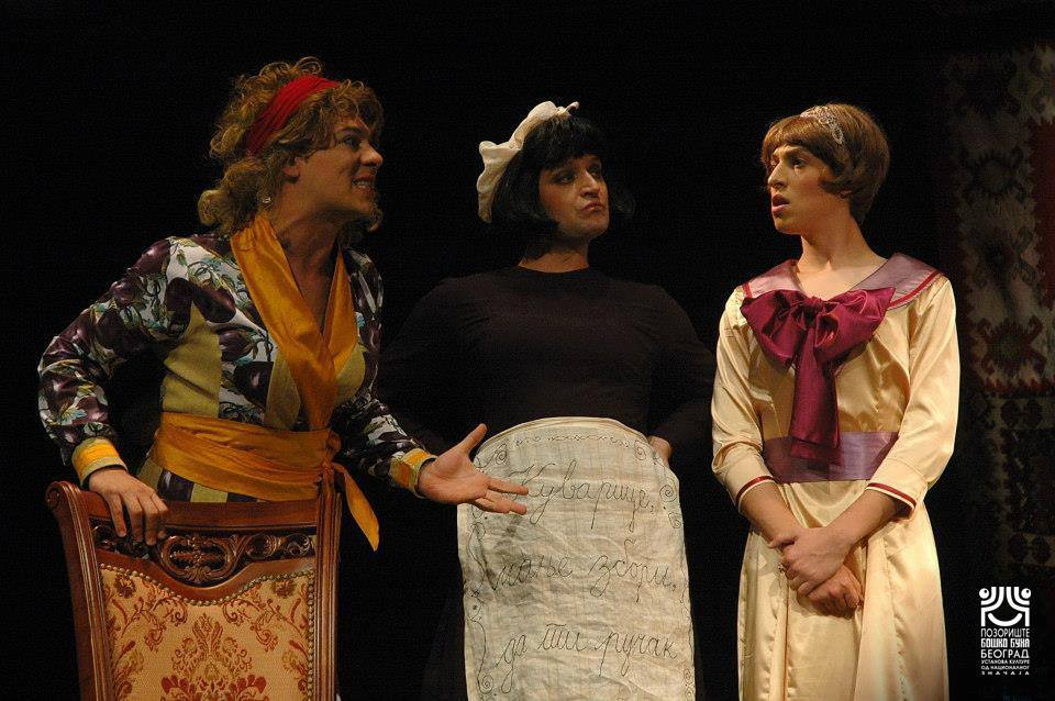 Српски (ћирилица): Сцене са премијере позоришне представе "Госпођа Министарка" у извођењу ансамбла позоришта Бошко Буха. На слици Горан Јевтић, Немања Оливерић и Урош Јовчић.